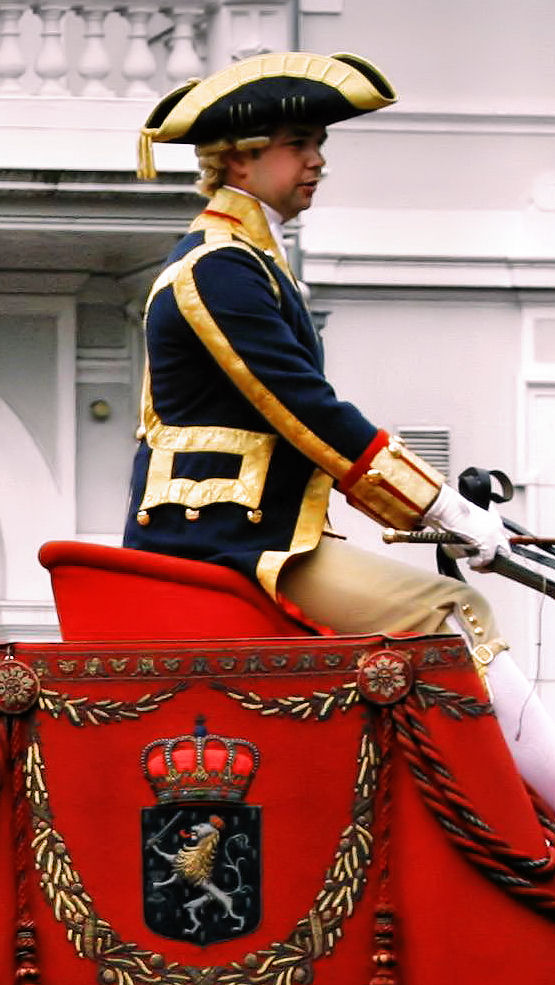 Koninklijk Koetsier